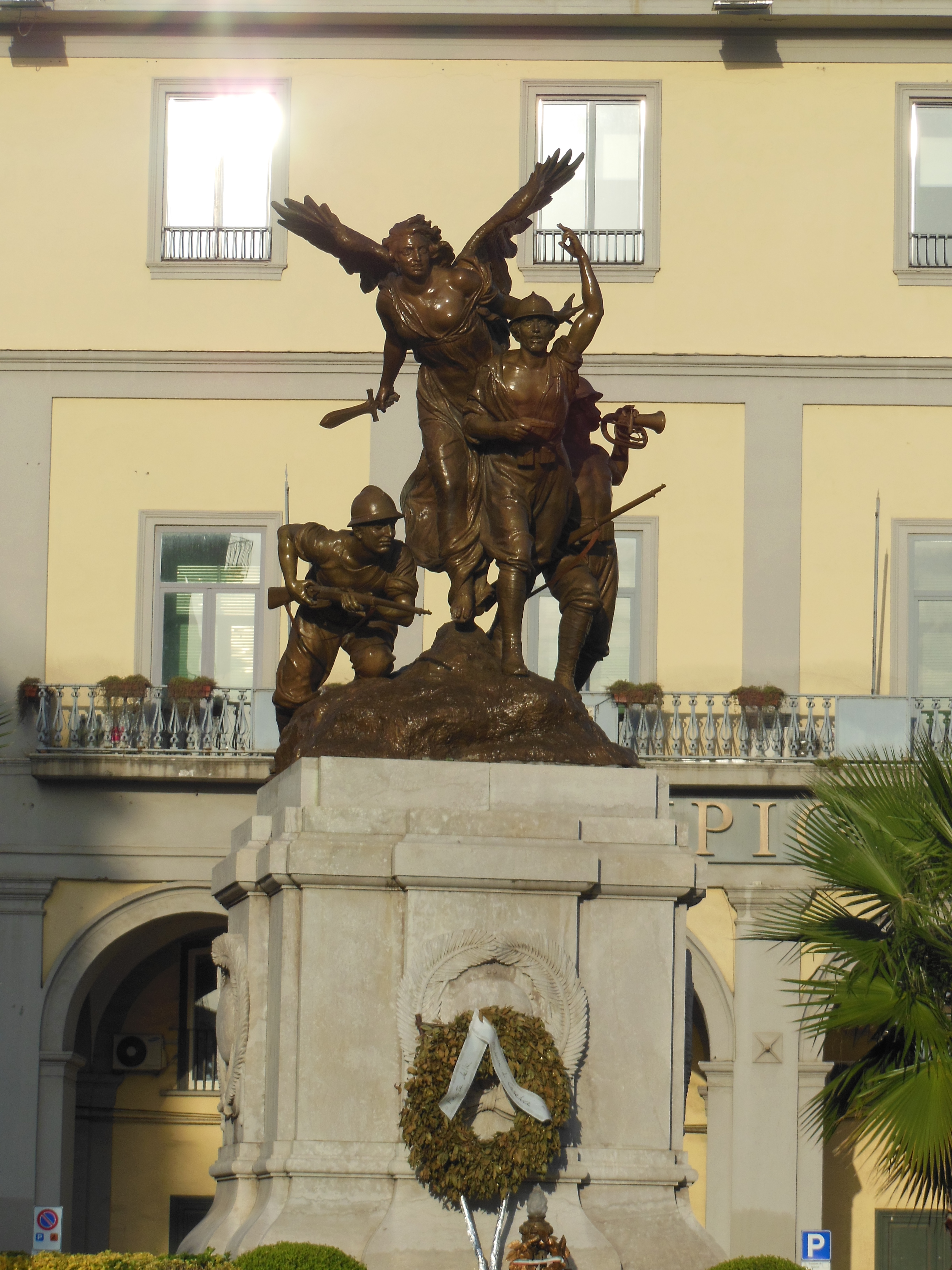 Opera propria